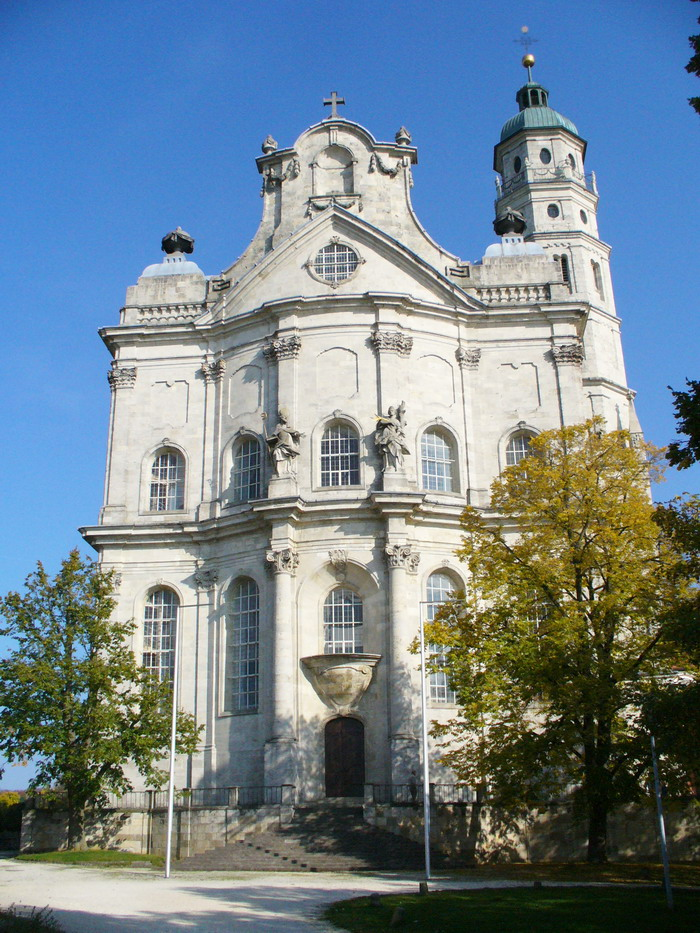 Neresheim Klosterkirche Frontansicht West